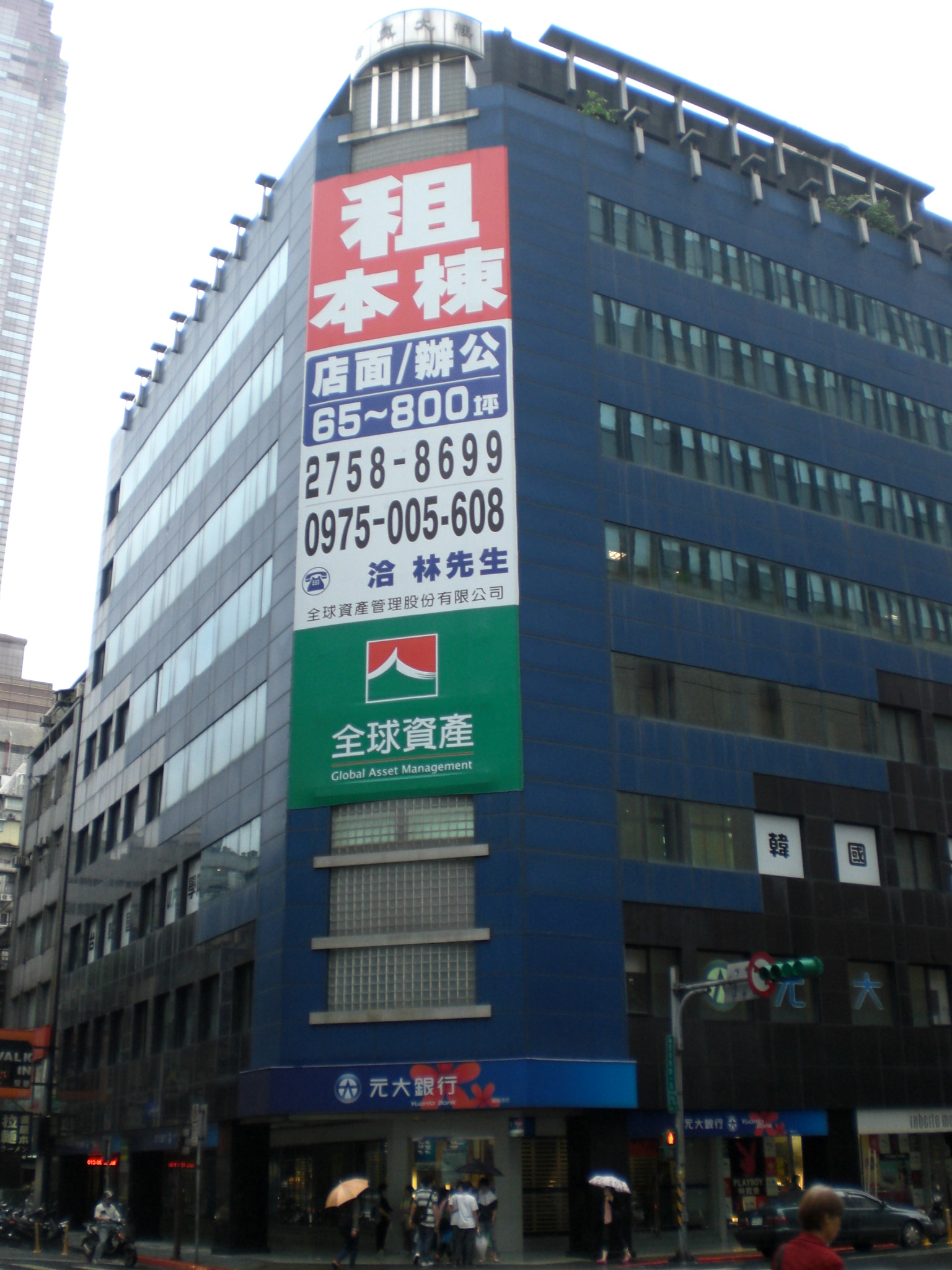 台鳳大樓。